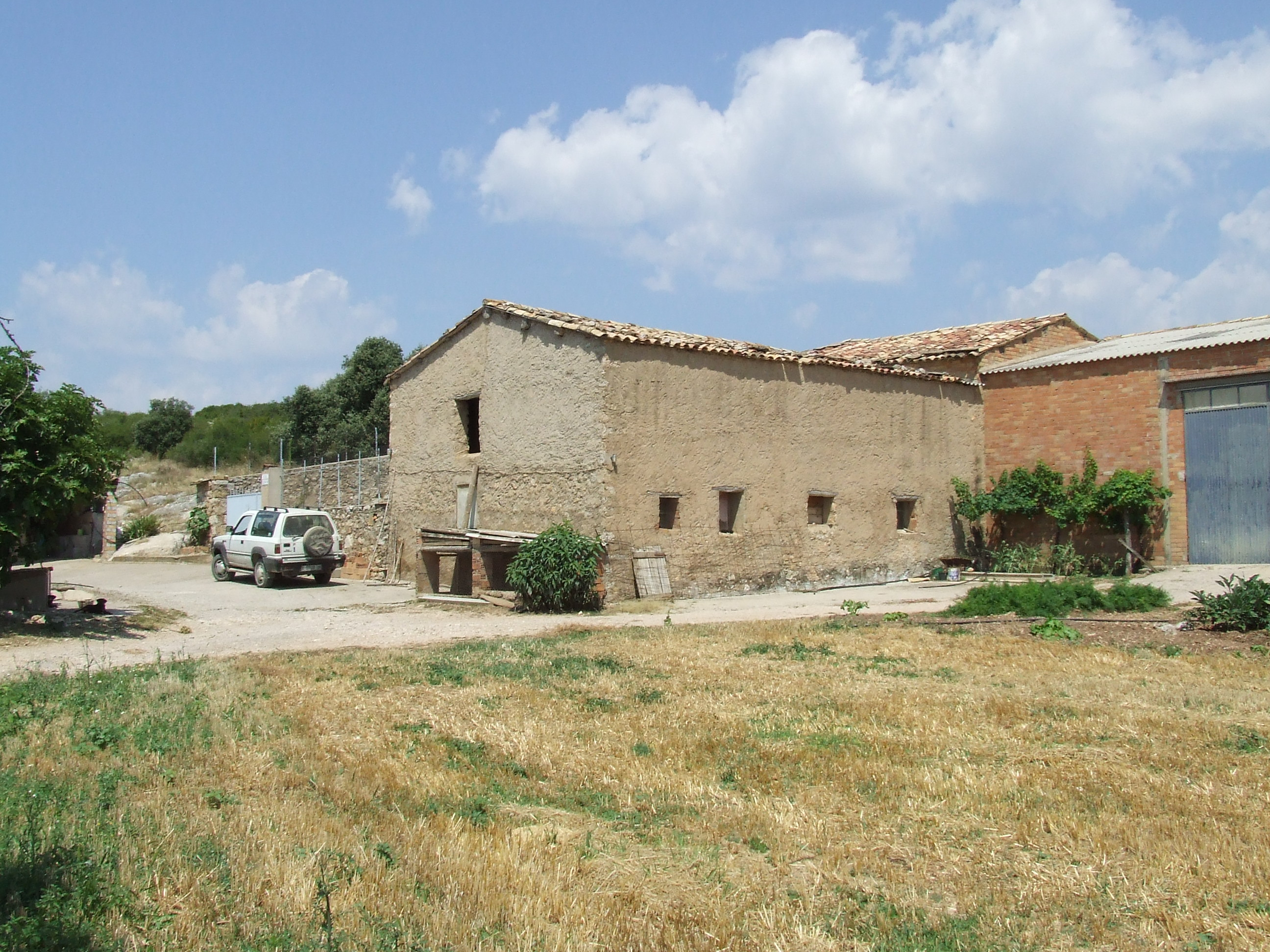 Casa Xinco (Abella de la Conca, Pallars Jussà)